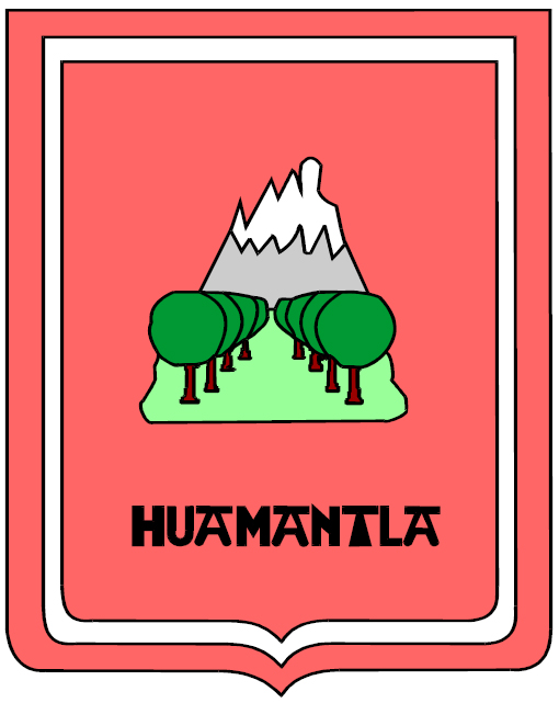 Escudo del municipio de huamantla